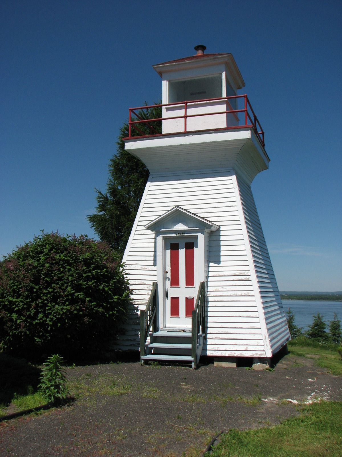 Le phare de plus près